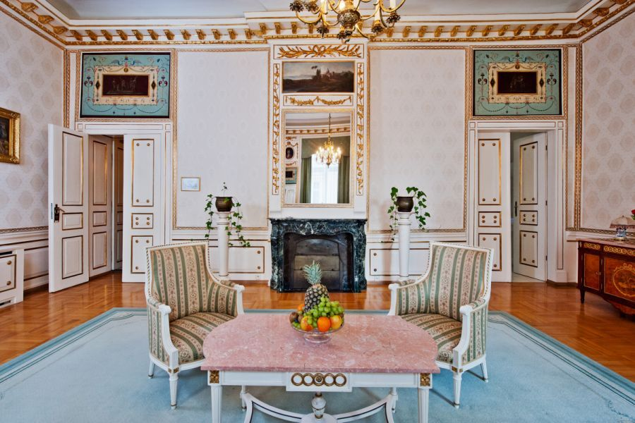 Apartament Grand Hotel kraków